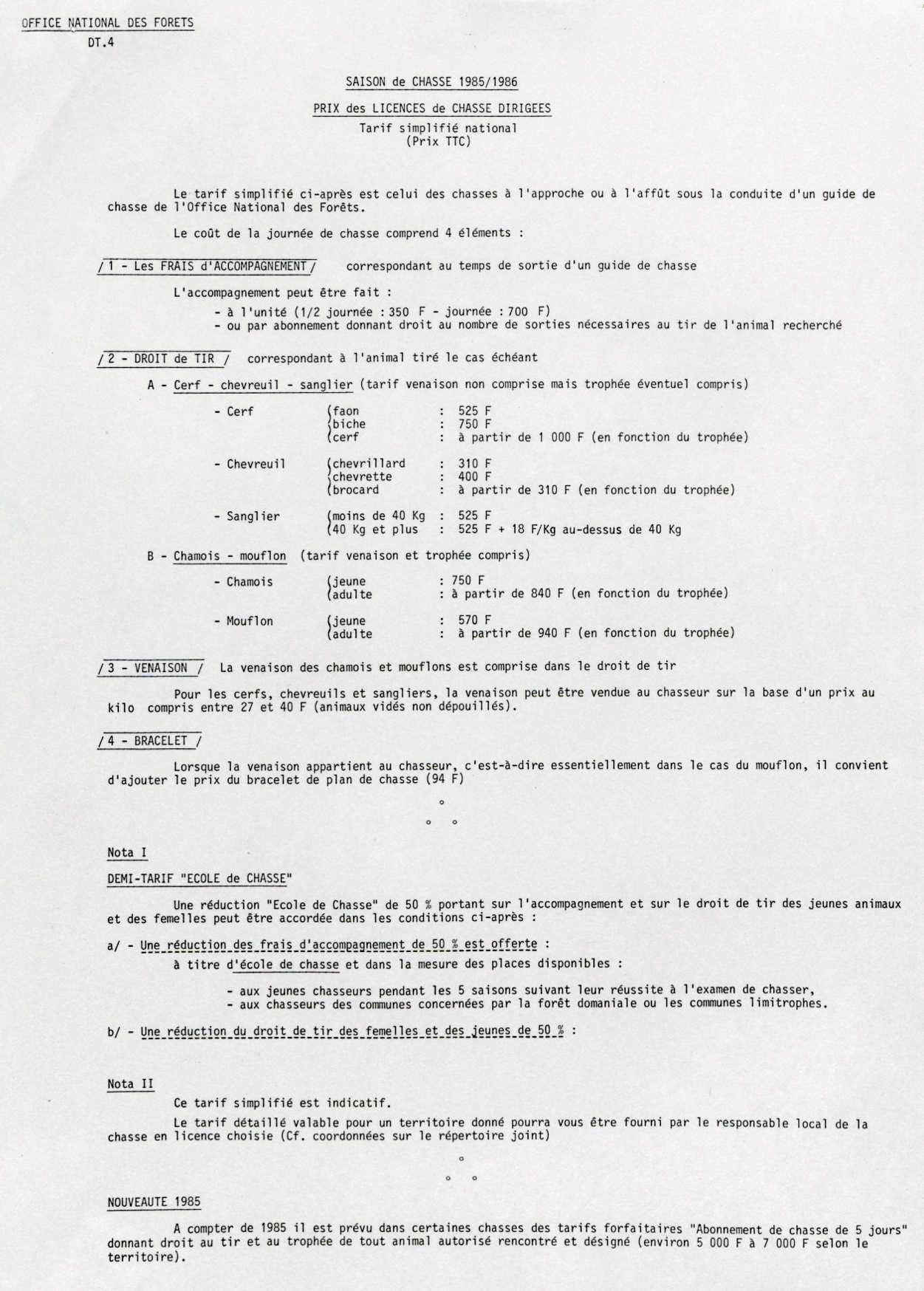 Prix des licences de chasse dite « dirigée », c’est-à-dire assurée par un guide de chasse spécialisé de l’Office national des forêts, 1985.